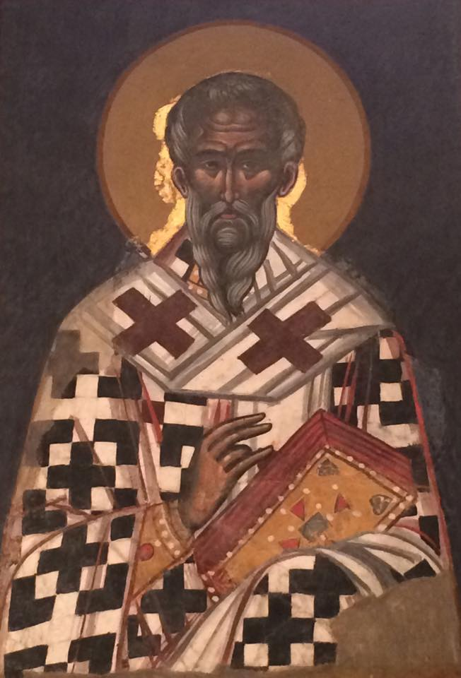 Дионисий Ареопагит (фрагмент стеной росписи Афонского монастыря Пантократор)